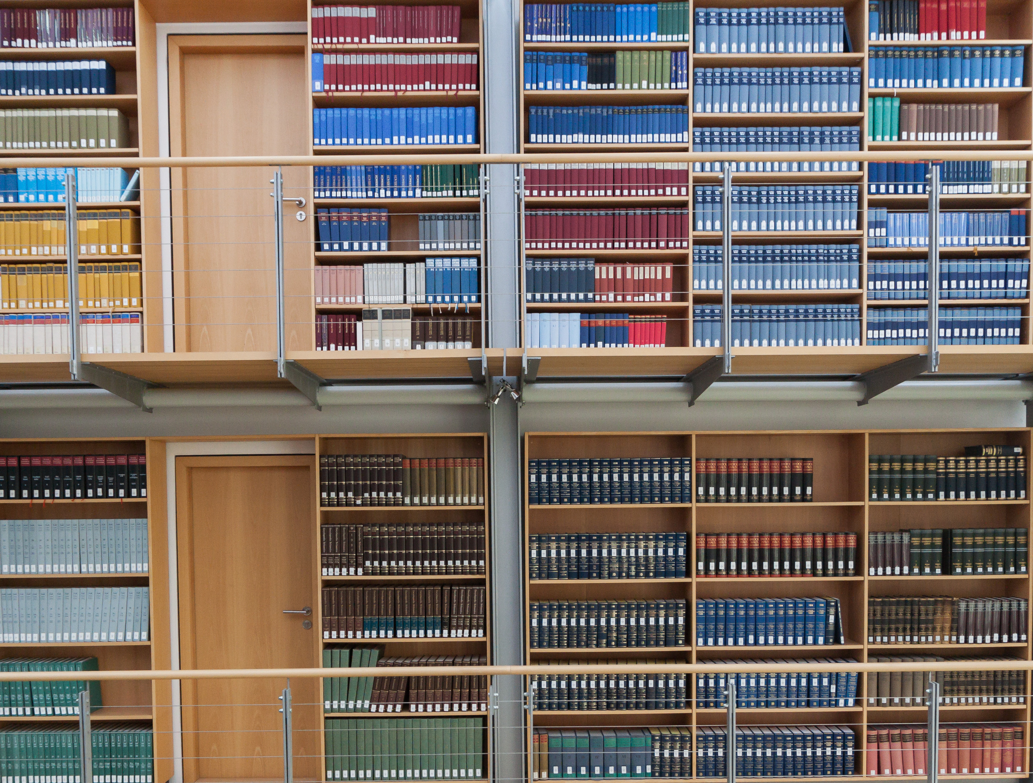 Blick in die Landschaftsbibliothek in Aurich